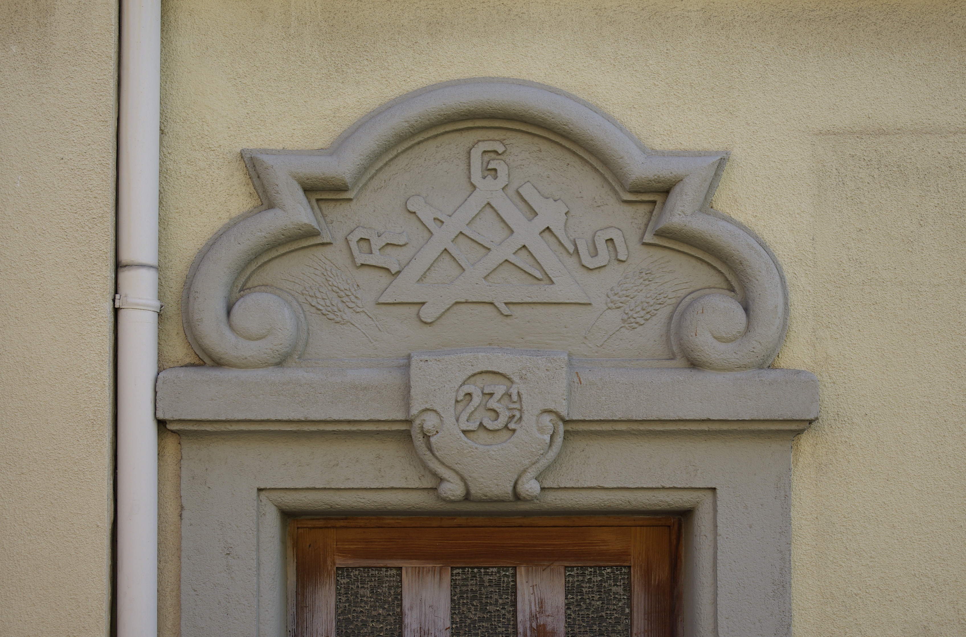 Wohnhaus Werner-von-Siemensstraße 21, 23, 23 ½ / Gabelsbergerstraße 1, 1 ½ in Erlangen